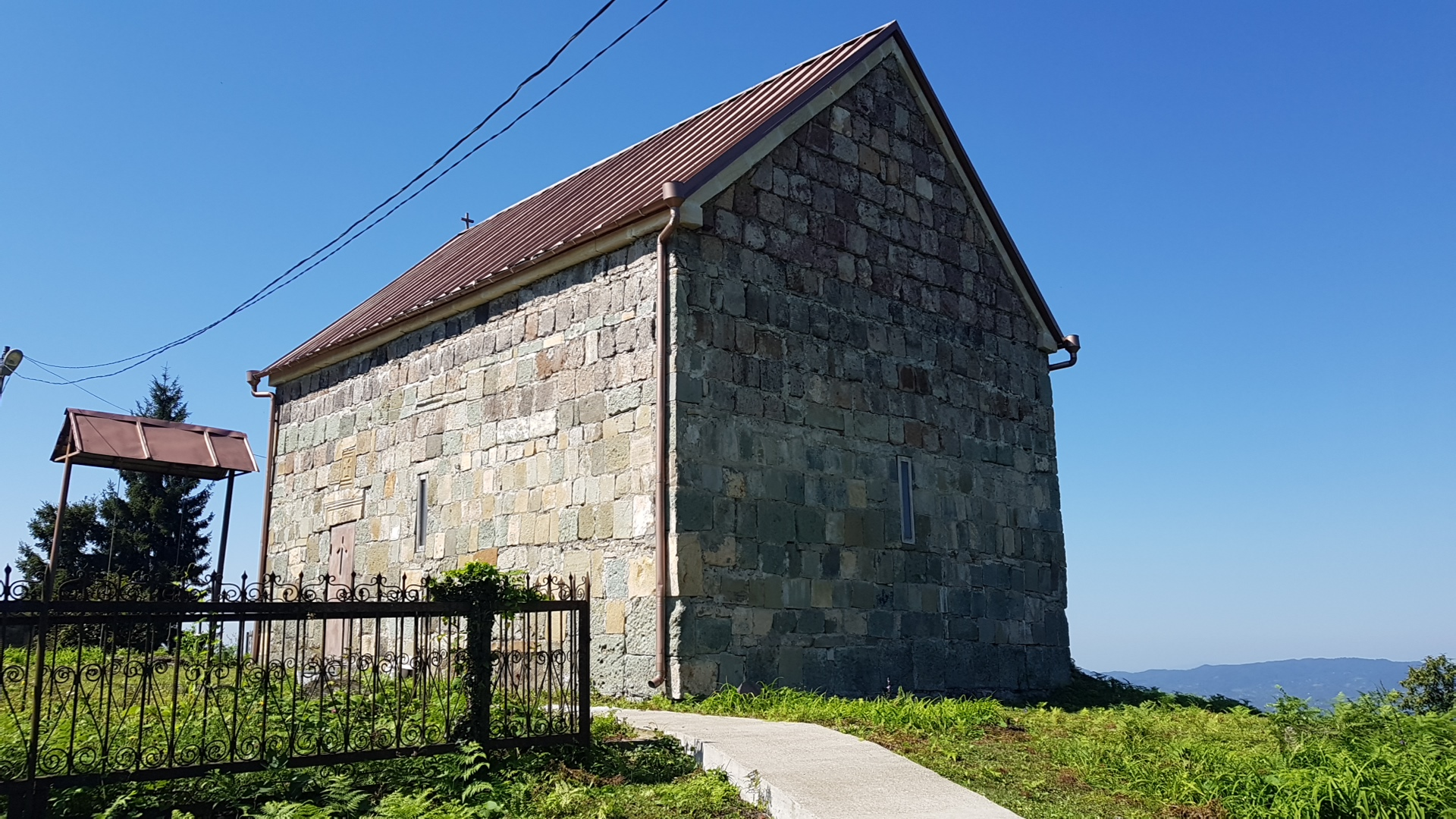 Vaniskedi Church